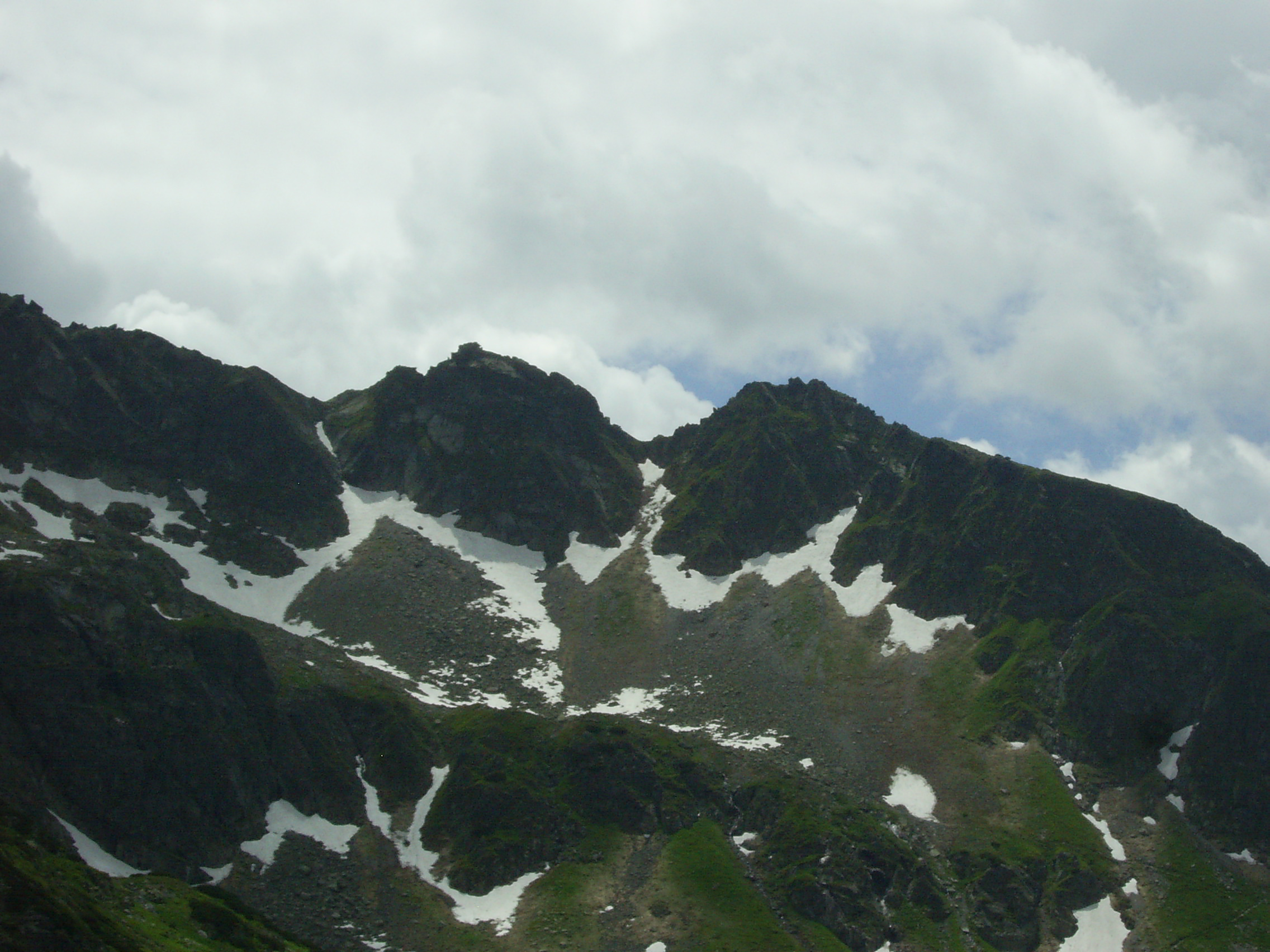 Wyżnia Liptowska Ławka, Wyżni Liptowski Kostur, Niżnia Liptowska Ławka, Niżni Liptowski Kostur, widziane znad Wielkiego Stawu Polskiego